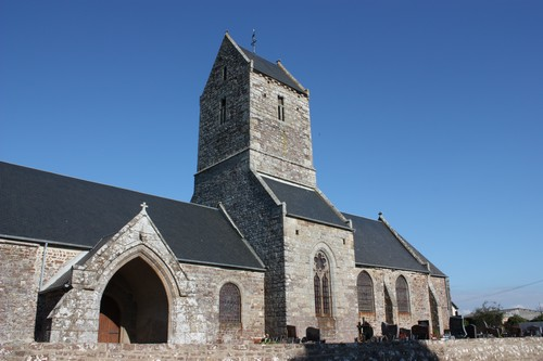 Fin XIème début XIIème siècle